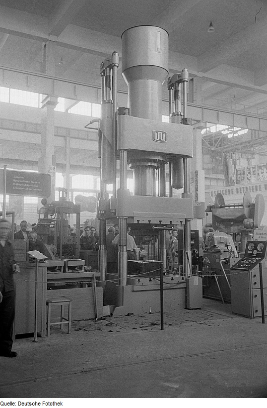 Original image description from the Deutsche Fotothek Hydraulische Presse der VVB Werkzeugmaschinen und Werkzeuge Chemnitz (WMW), Technische Messe 1953